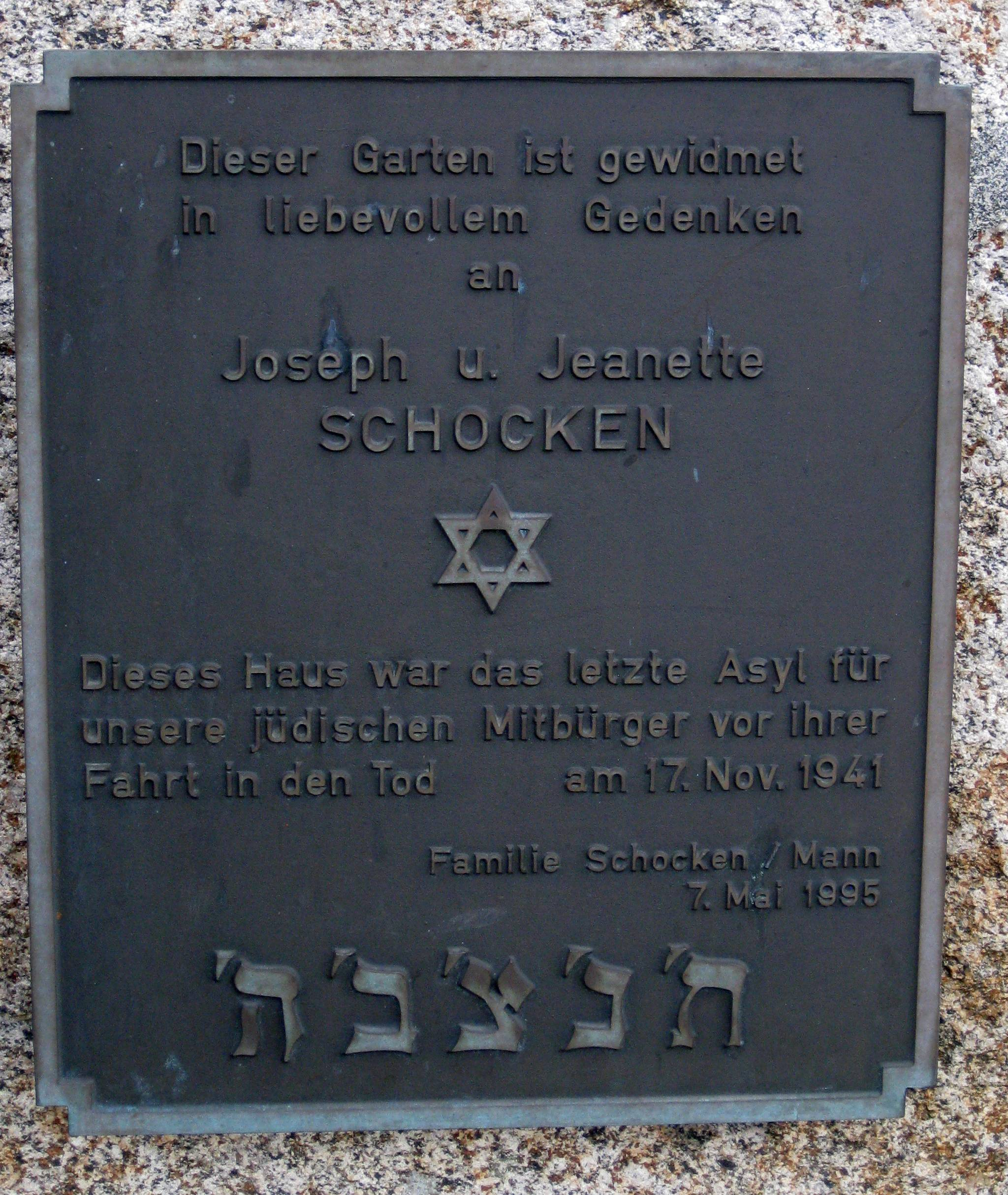 Gedenktafel vor der Villa Schocken in Bremerhaven